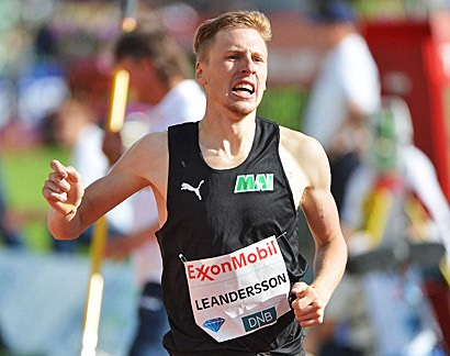 Jonas på Bislet 2014.